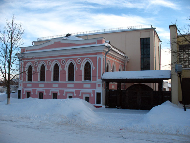 Ветка. Веткаўскі музей